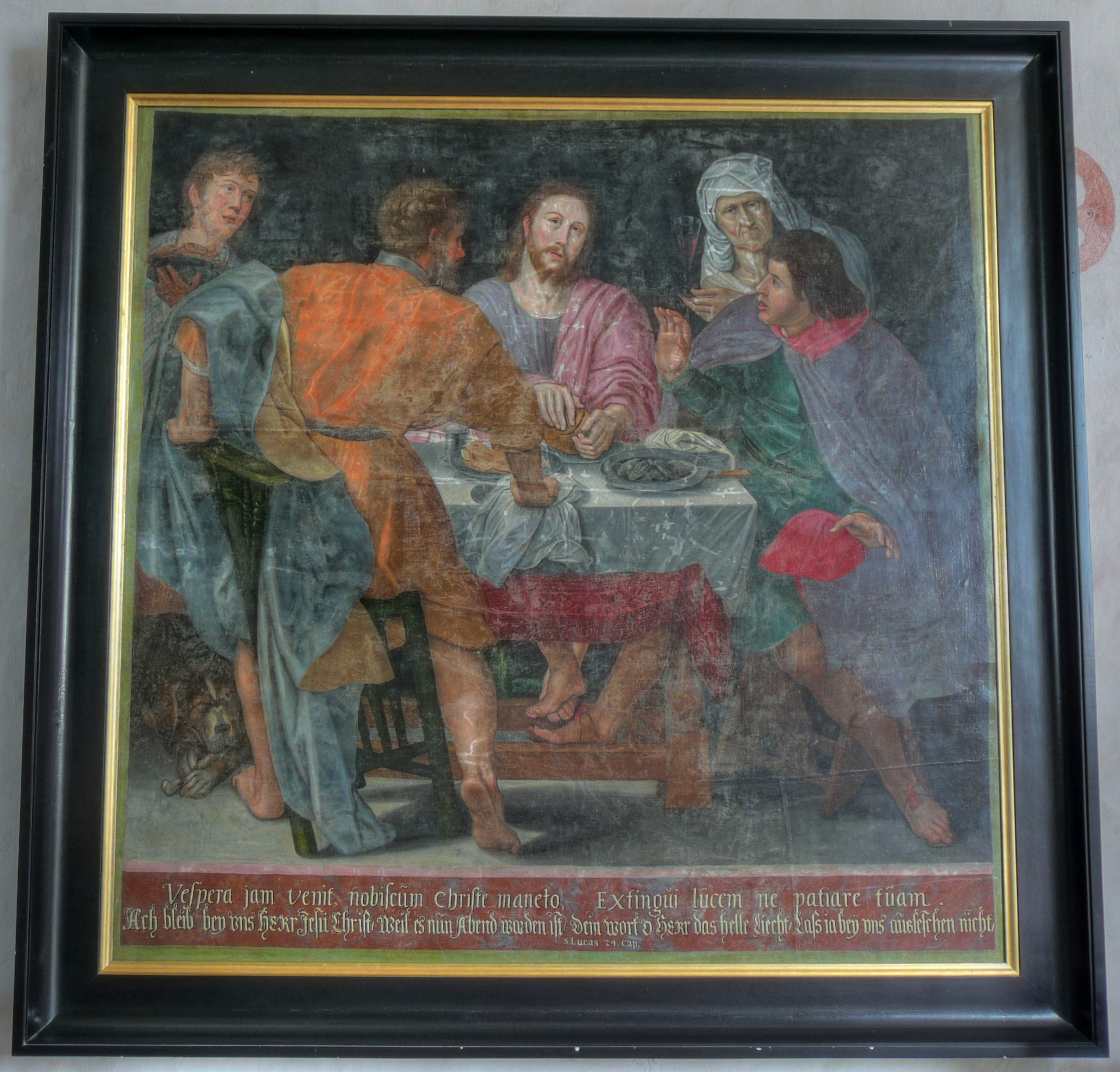 Jesus und die Emmaus-Jünger, Gemälde in der St.-Pauli-Kirche zu Bobbin auf Rügen